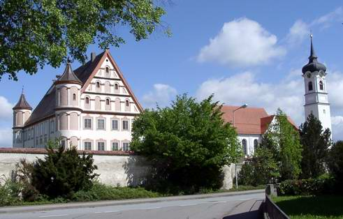 Ummendorf (bei Biberach) von Benutzer:Enslin selbst fotografiert am 23.5.2004; Schloss, rechts die kath. Kirche St. Johannes Evangelist;Bild ist unter der GNU FDL zur weiteren Verwendung freigegeben